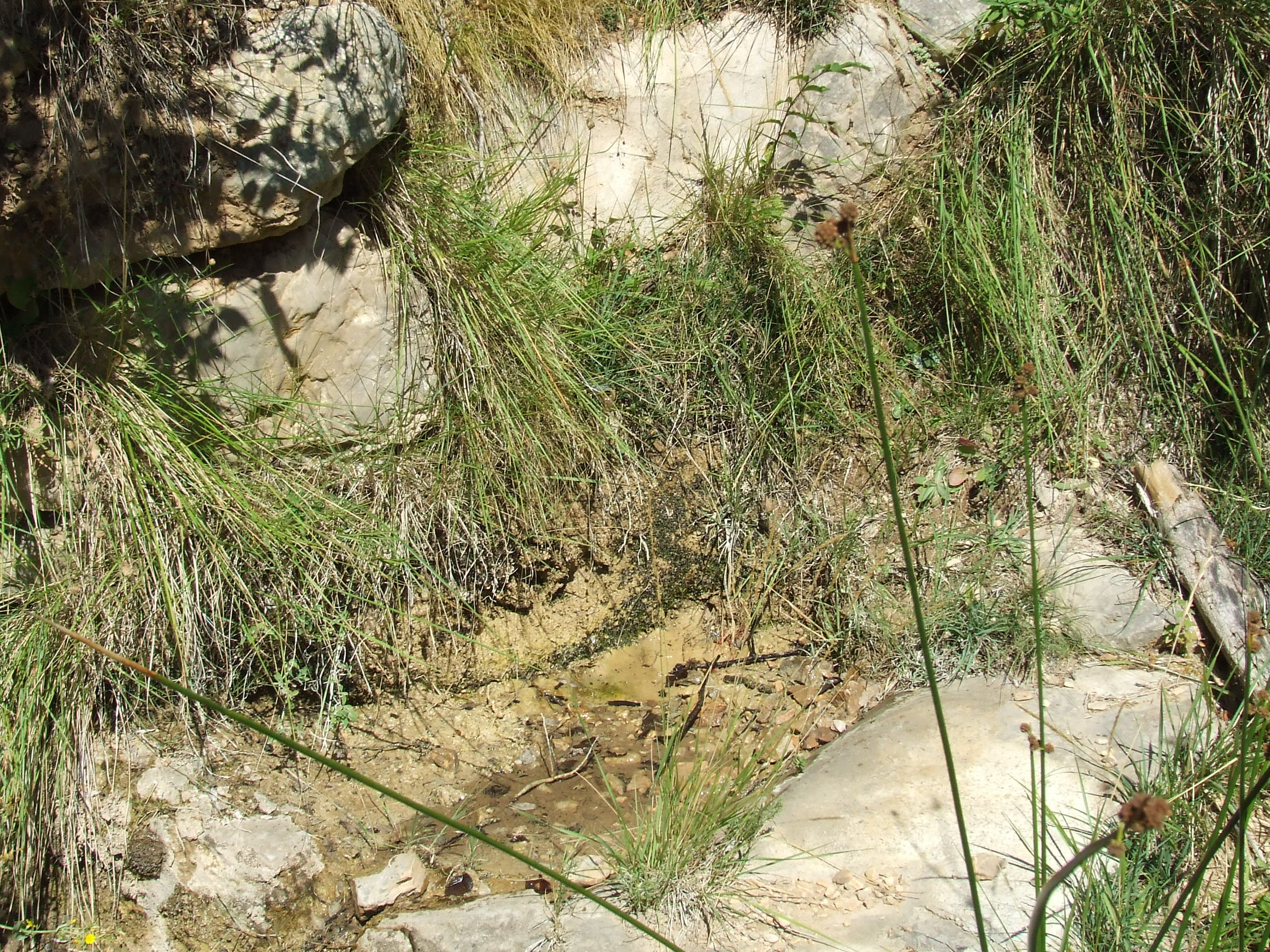 La Font de la Torre (la Torre d'Eroles, Abella de la Conca, Pallars Jussà)